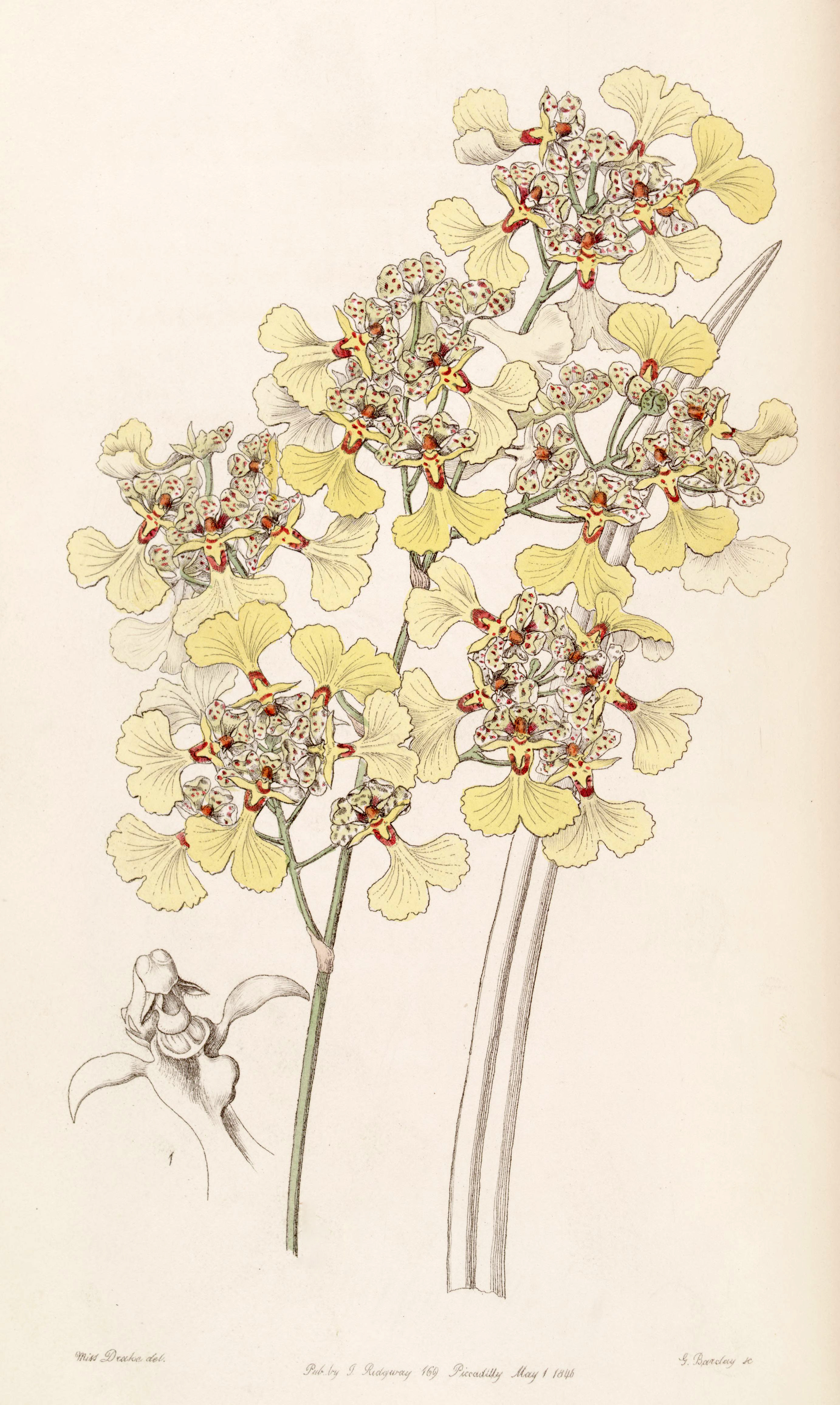 Trichocentrum lacerum (as syn. Oncidium lacerum)